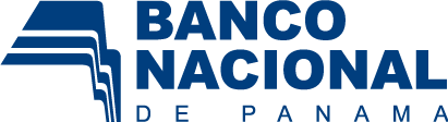 Logo Banco Nacional de Panamá